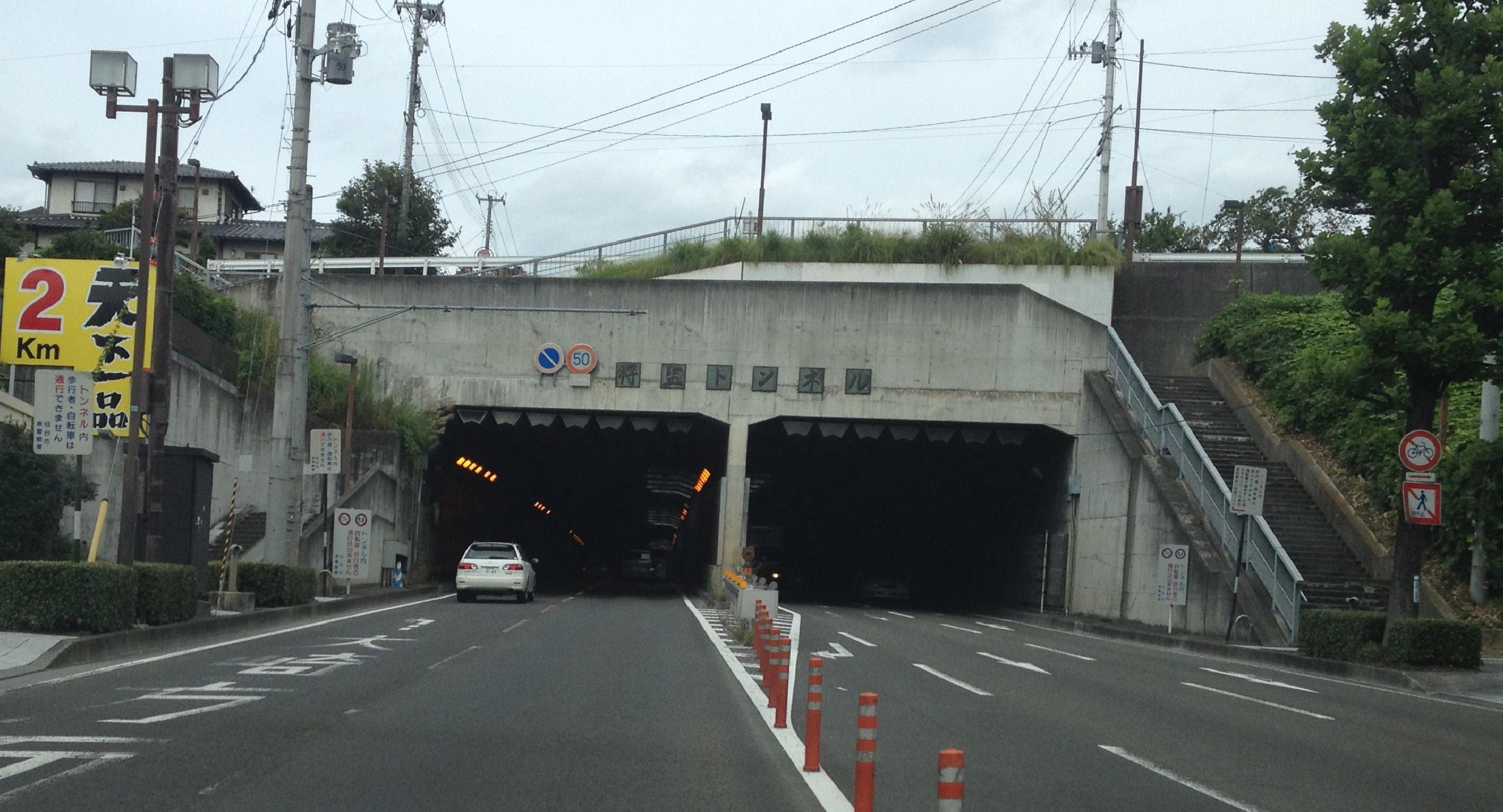 将監トンネル（仙台市泉区） 南側出入口